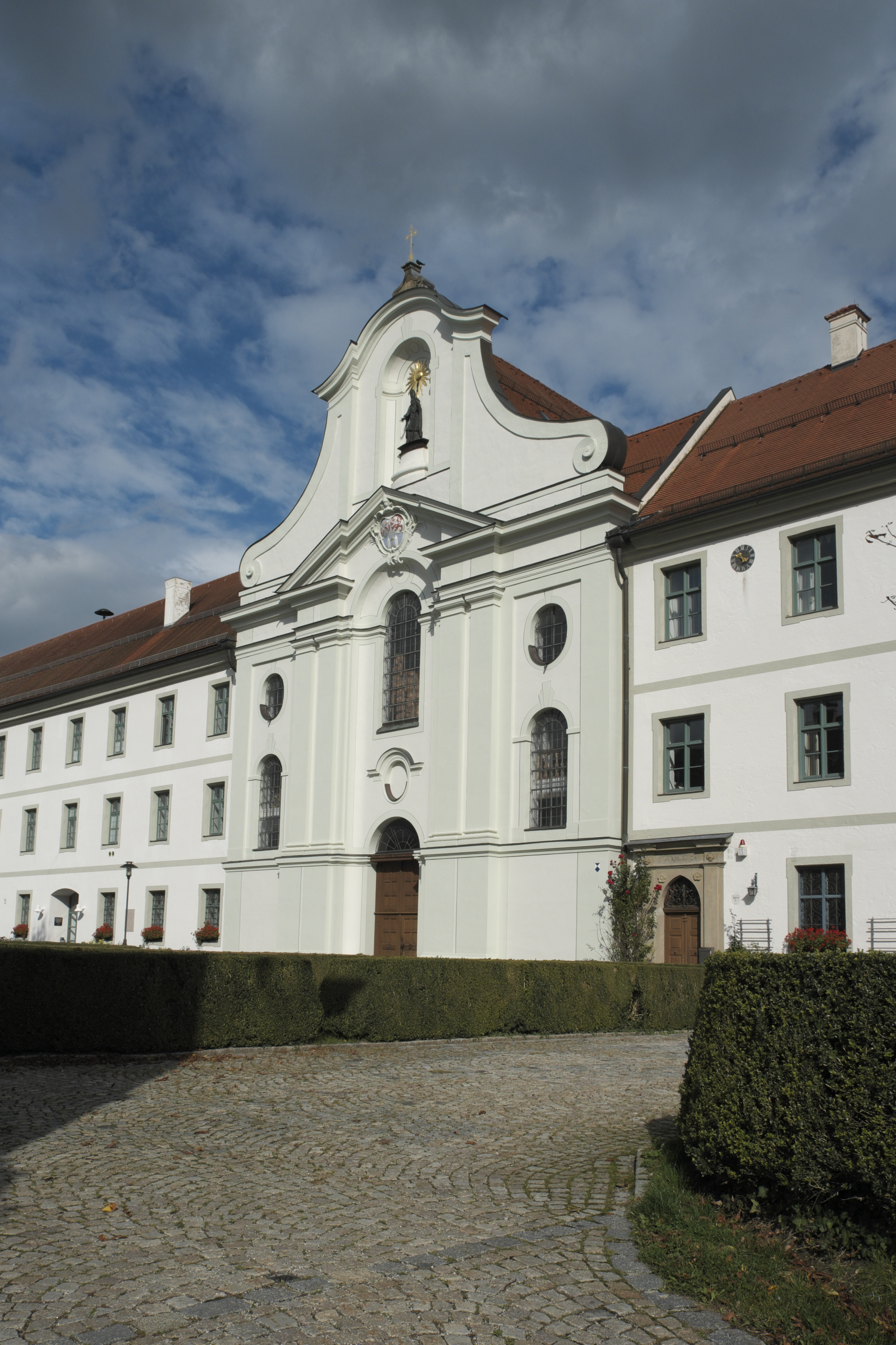 Katholische Pfarrkirche St. Marinus und Anianus, ehemalige Abteikirche des Benediktinerklosters Rott in Rott am Inn im Landkreis Rosenheim (Bayern/Deutschland)